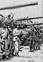 اللواء العشرين